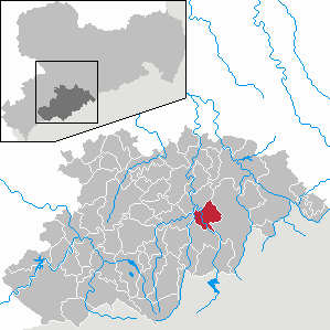 Großrückerswalde im Erzgebirgskreis, Sachsen